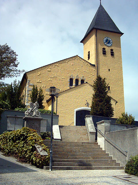 Lappersdorf, Bayern: Die katholische Pfarrkirche